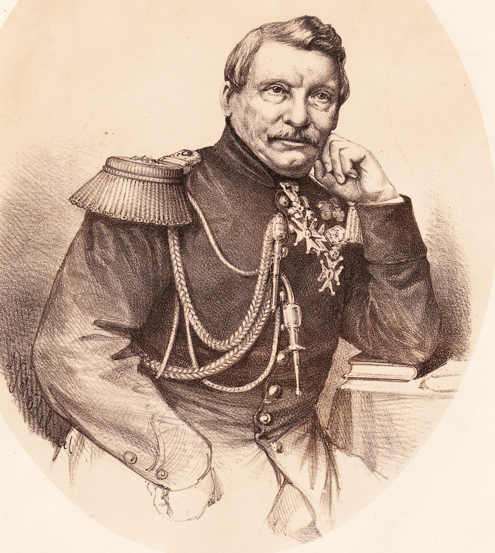 Luitenant generaal Jan van Swieten